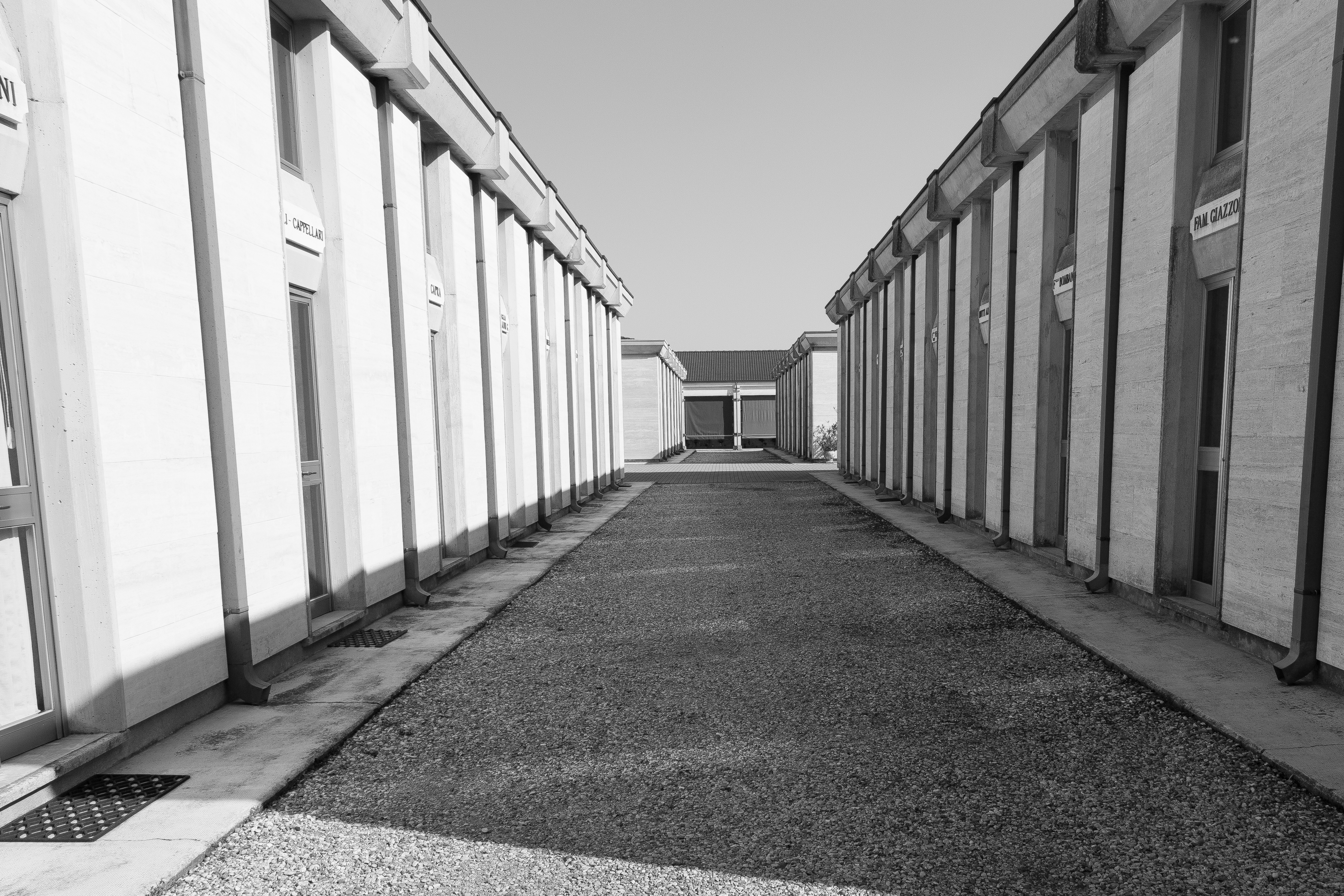 cimitero di Castel Goffredo This is a photo of a monument which is part of cultural heritage of Italy.